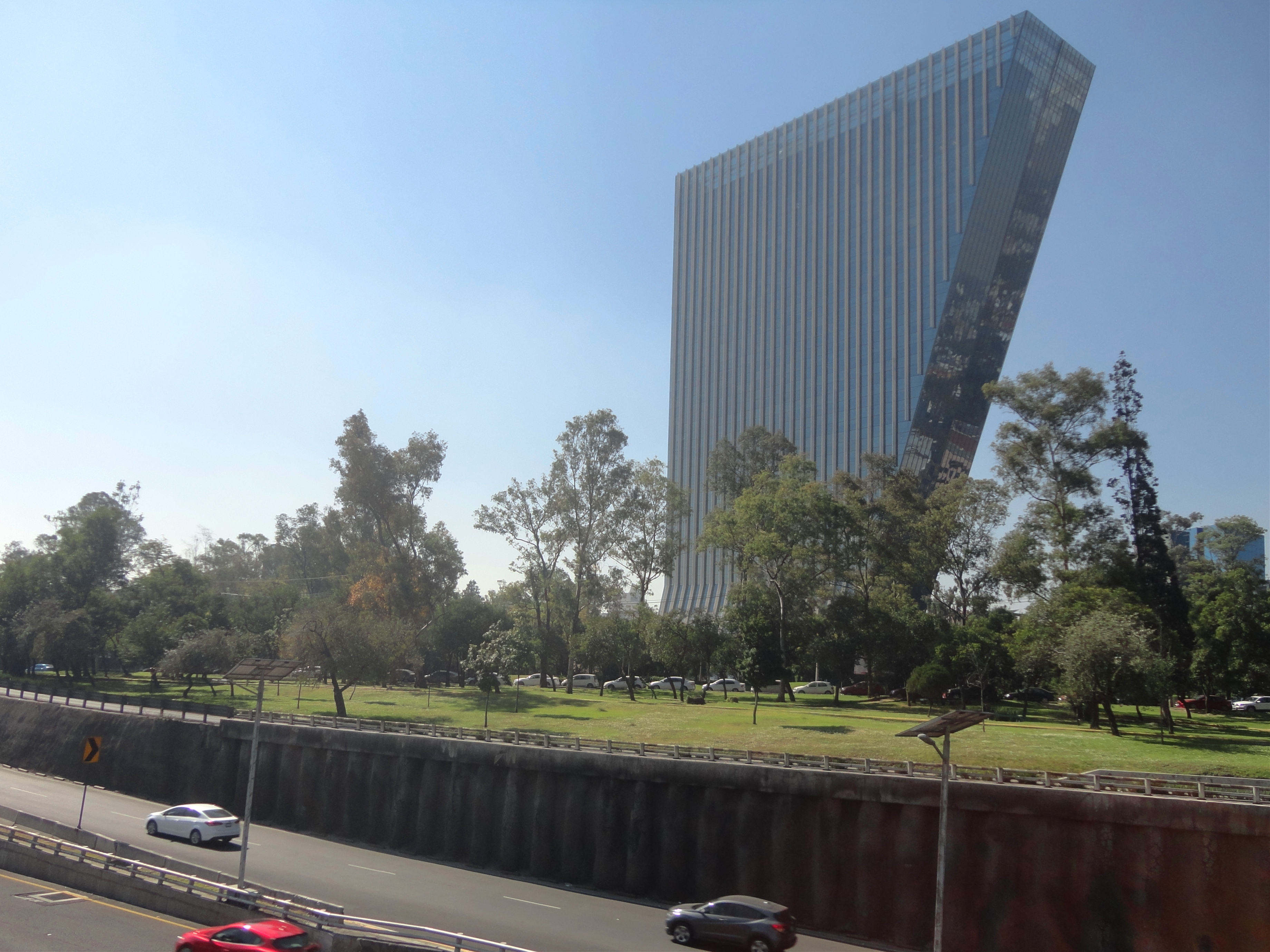 Torre Virreyes - Lomas de Chapultepec - Ciudad de México